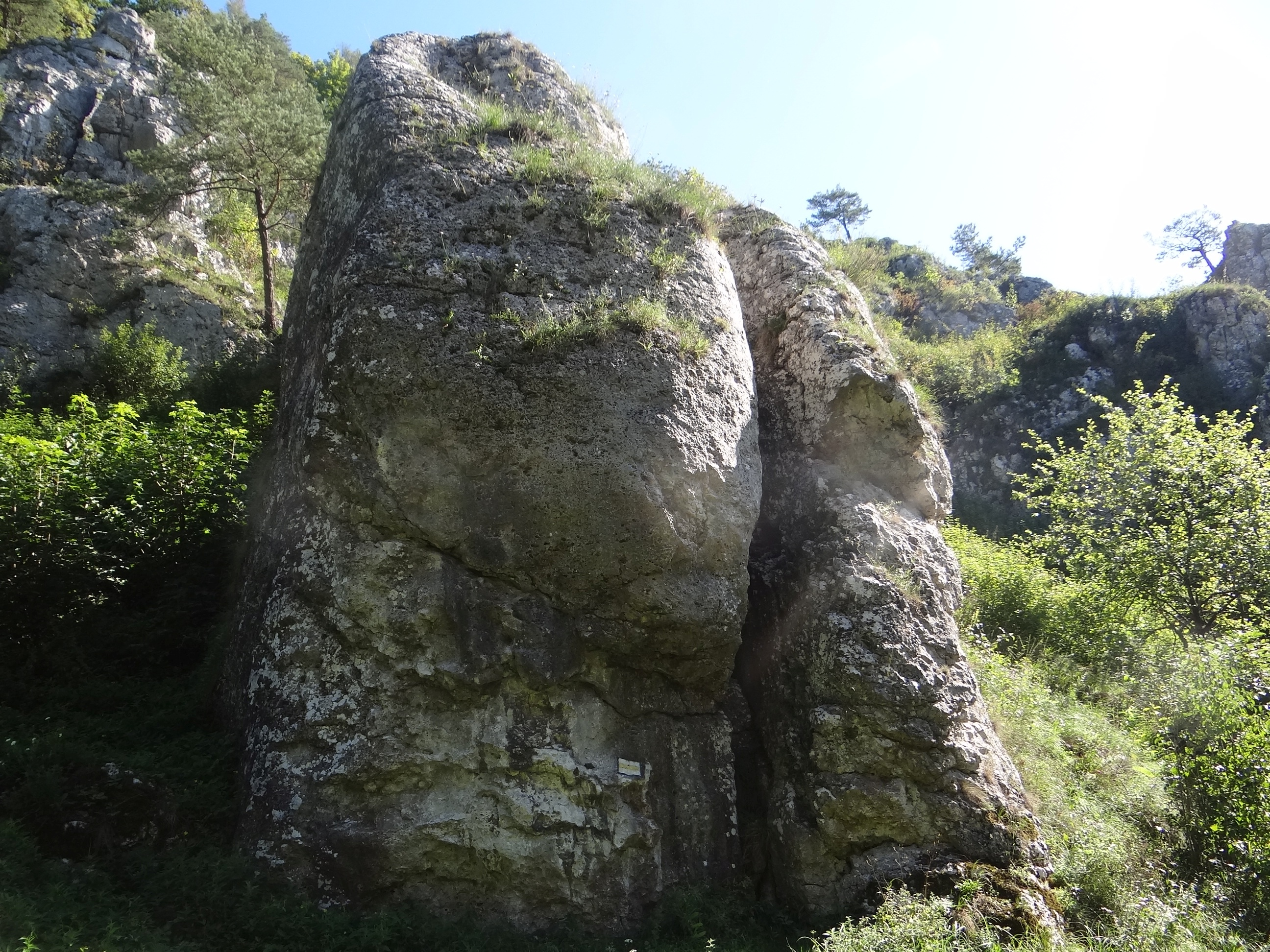 Poprzeczna Grzęda w Dolinie Bolechowickiej